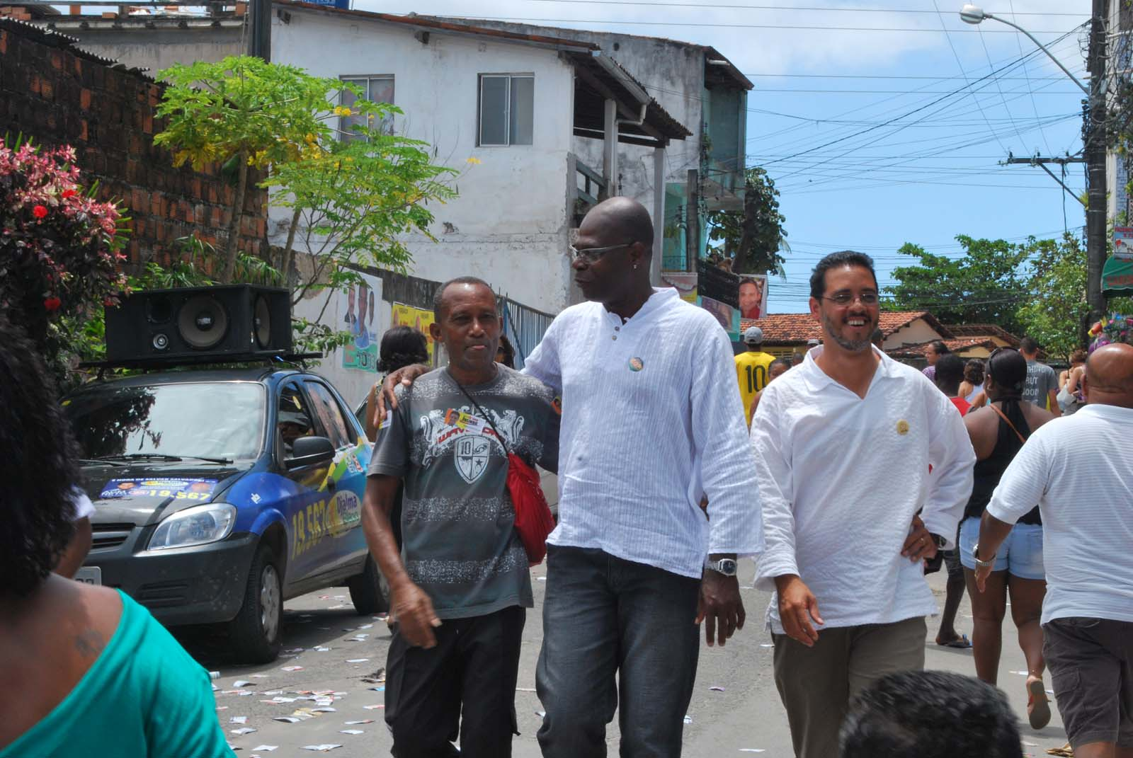 Foto: Ag haack/Bahia notÍCias